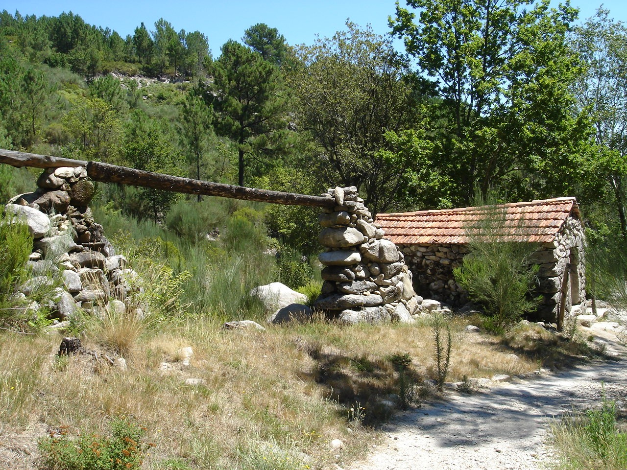 Moinho de água no Parque Florestal do Pisão (Bioparque)